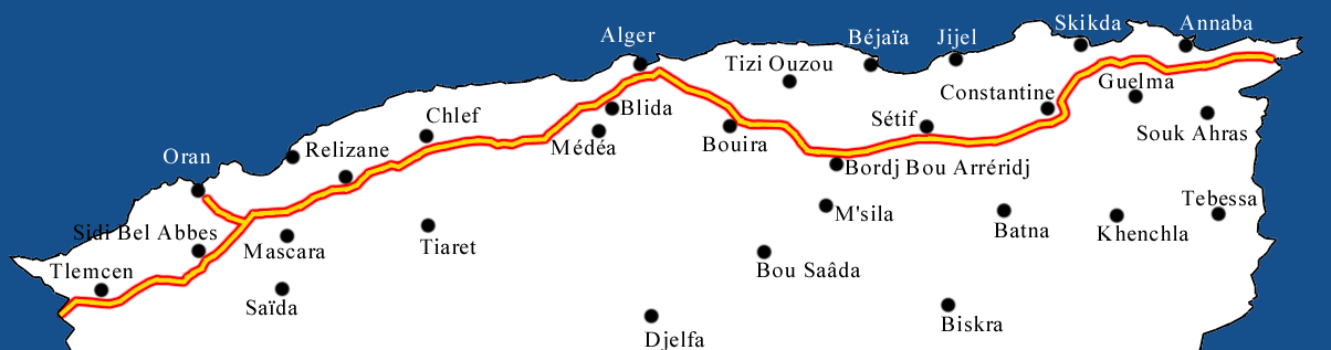 L'Autoroute Est-Ouest, d'une longueur de 1216 km (en construction, livraison prévue pour 2009), et les principales agglomérations de plus de 100 000 habitants du nord de l'Algérie.